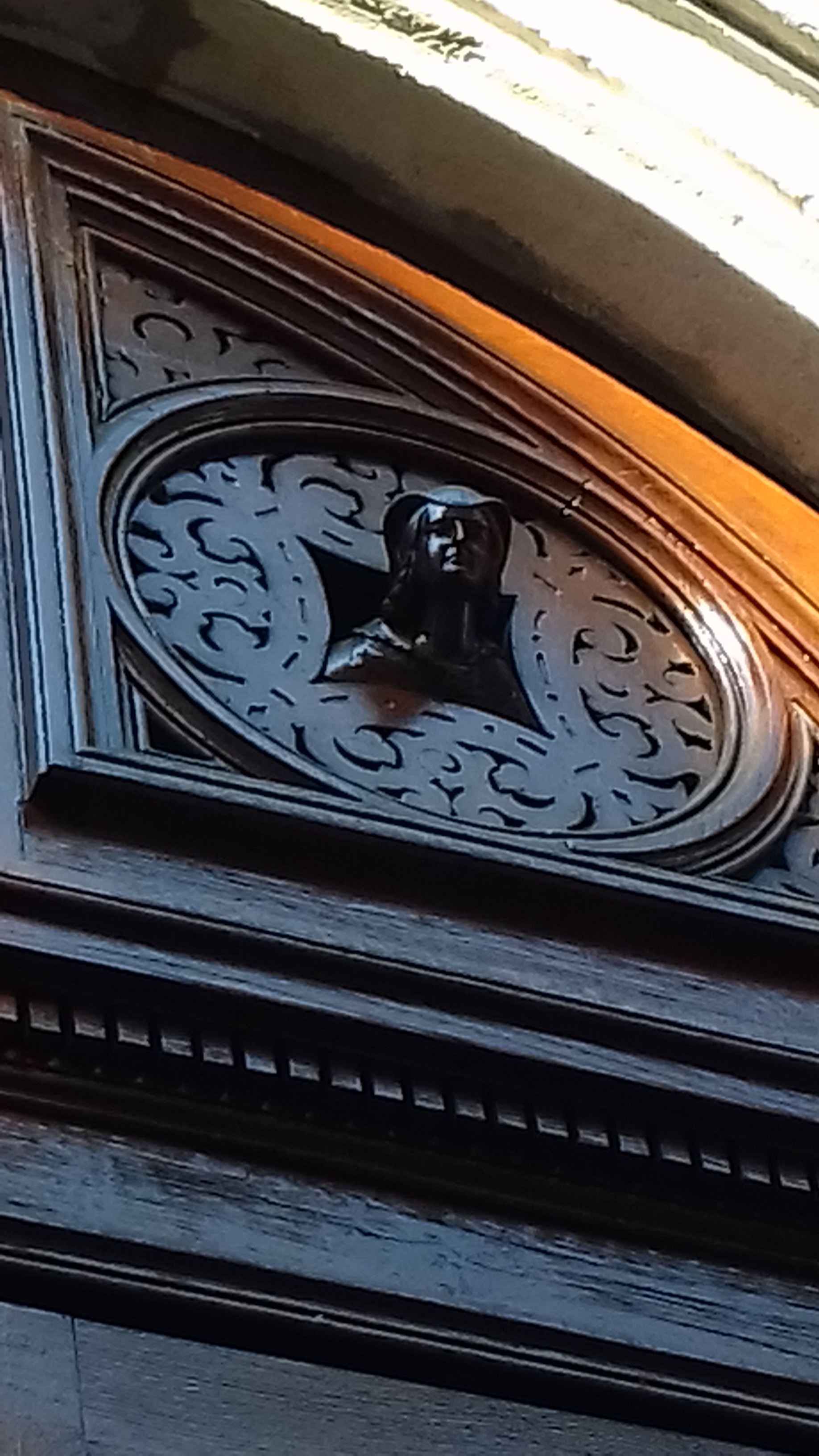 Porte 60 av Foch Lyon 6èarrdt détail sup gauche